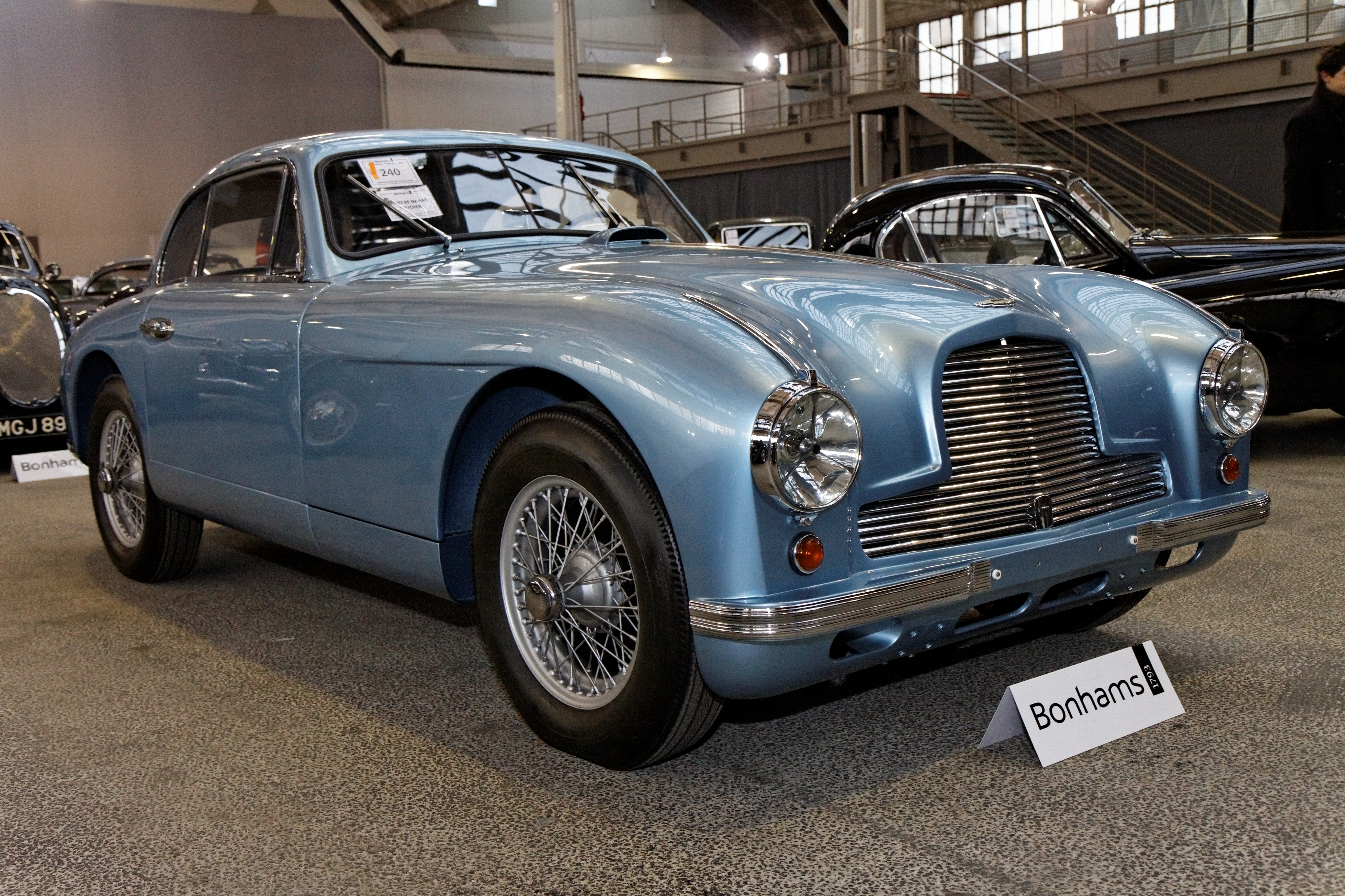 Aston Martin DB2 Vantage Saloon